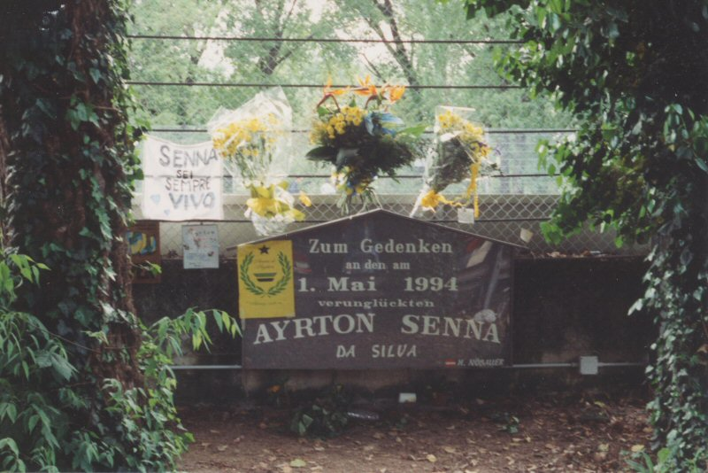 Ayrton Senna Memorial at Imola